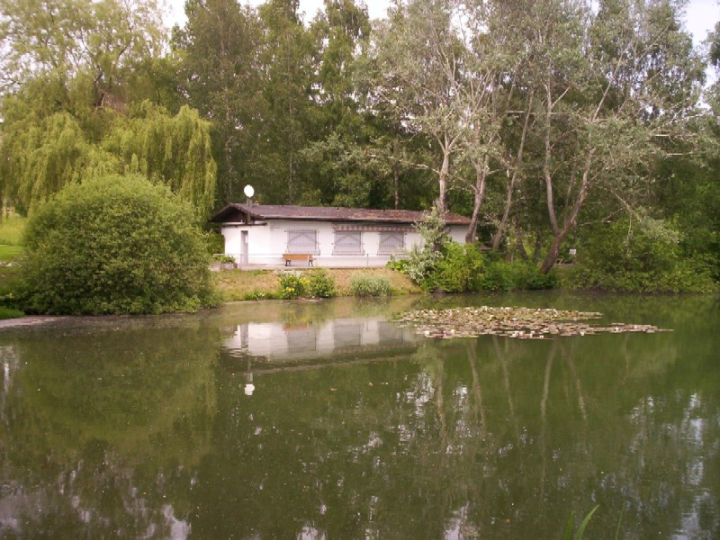 Fischweiher Waldernbach